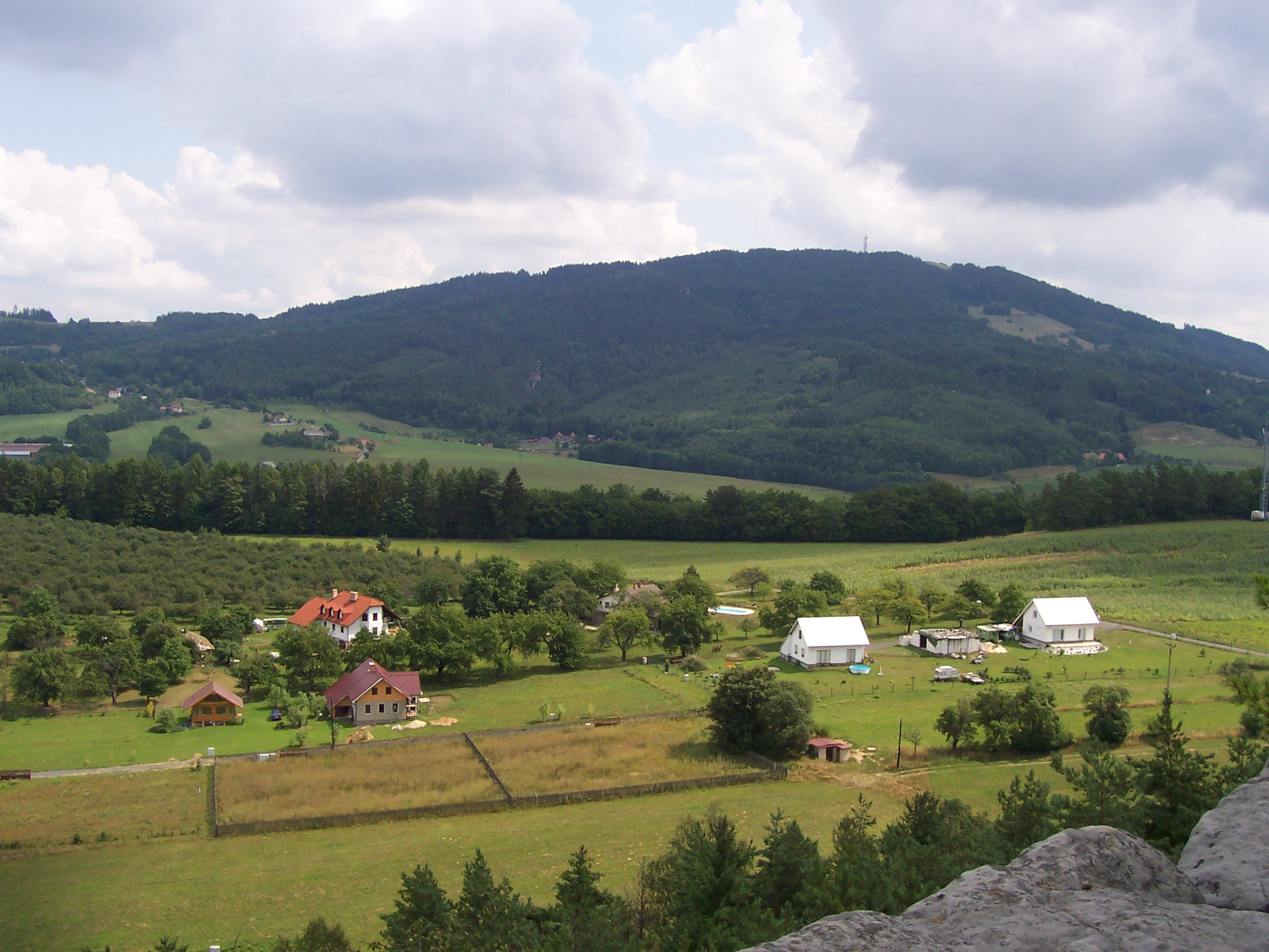 Kozákov in Czech Republic, Český ráj, view from Klokočí